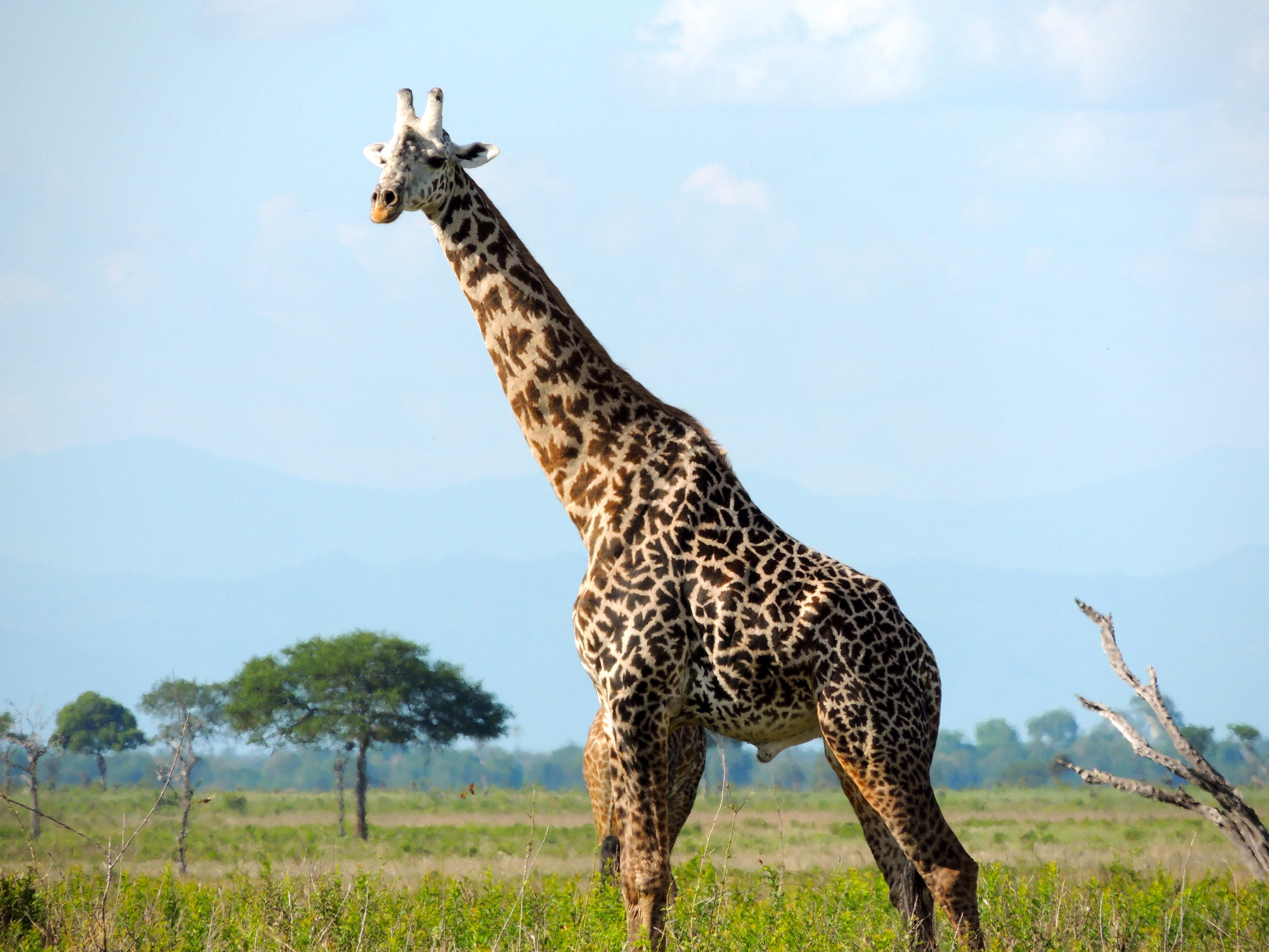 マサイキリンの雄。タンザニア北部のセレンゲティ国立公園にて。2013年1月中旬撮影。